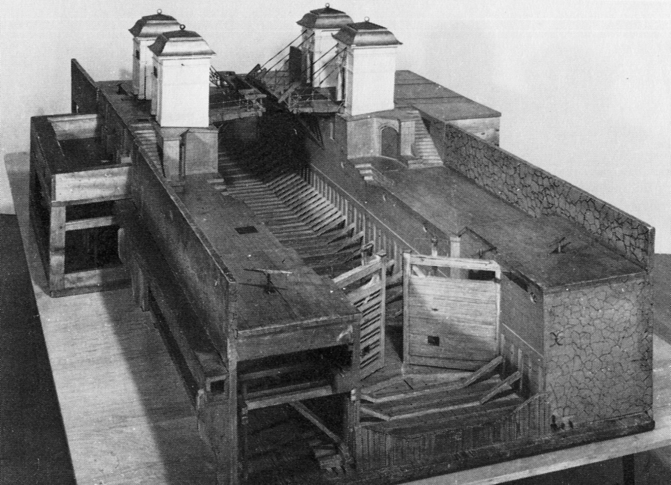 Modell visande Christopher Polhems sluss, byggd 1766 av Jonas Norberg